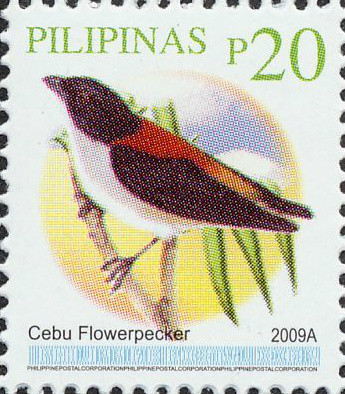 Cebu Flowerpecker (Dicaeum quadricolor)